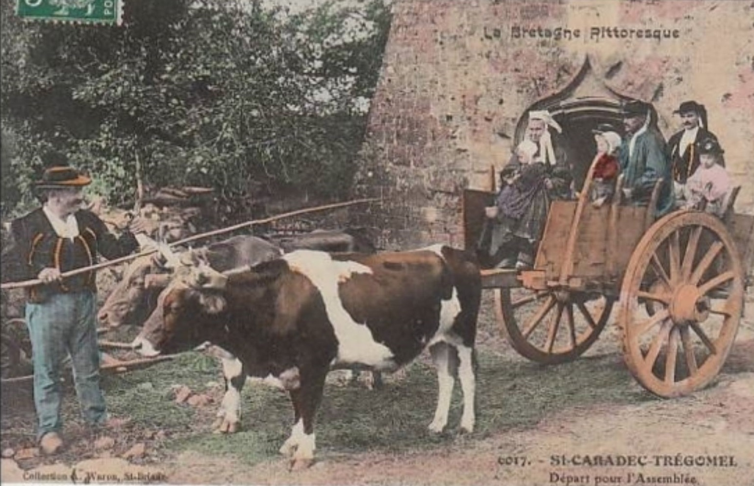 carte postale du début du XXe siècle avec en illustration photo une scène de départ pour l'assemblée dominicale en charrette tirée par des boeufs de paroissiens de Saint-Caradec-Trégomel.